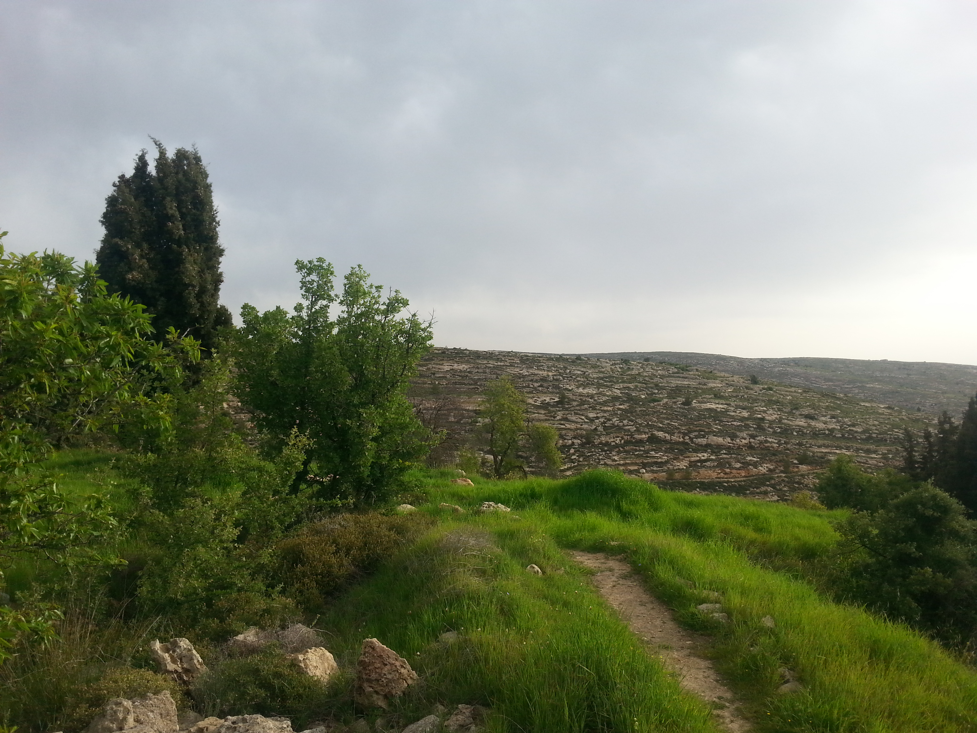 השביל ההיקפי של הכפר העברי הקדום, מבט לצפון